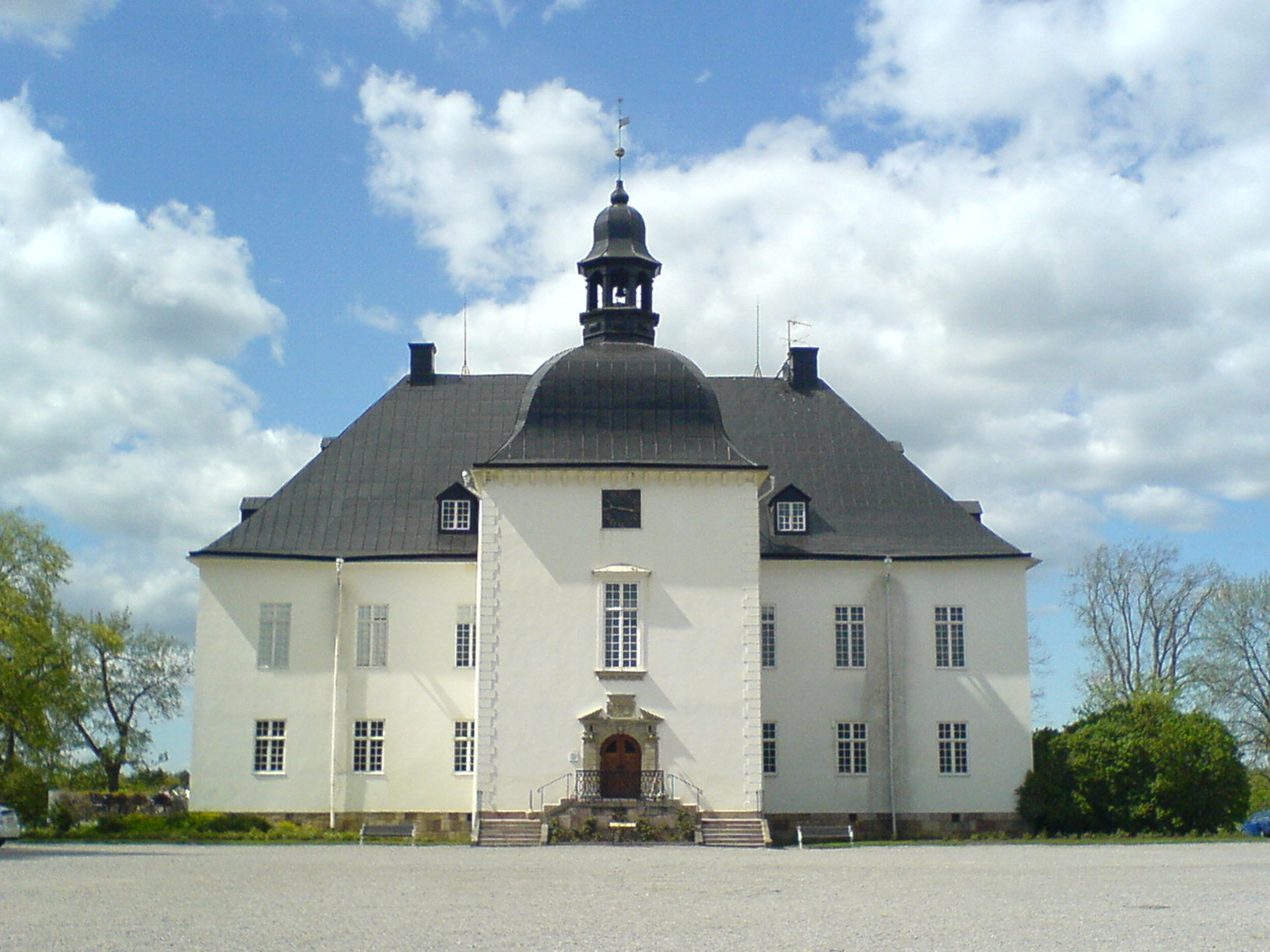 Årsta slott.